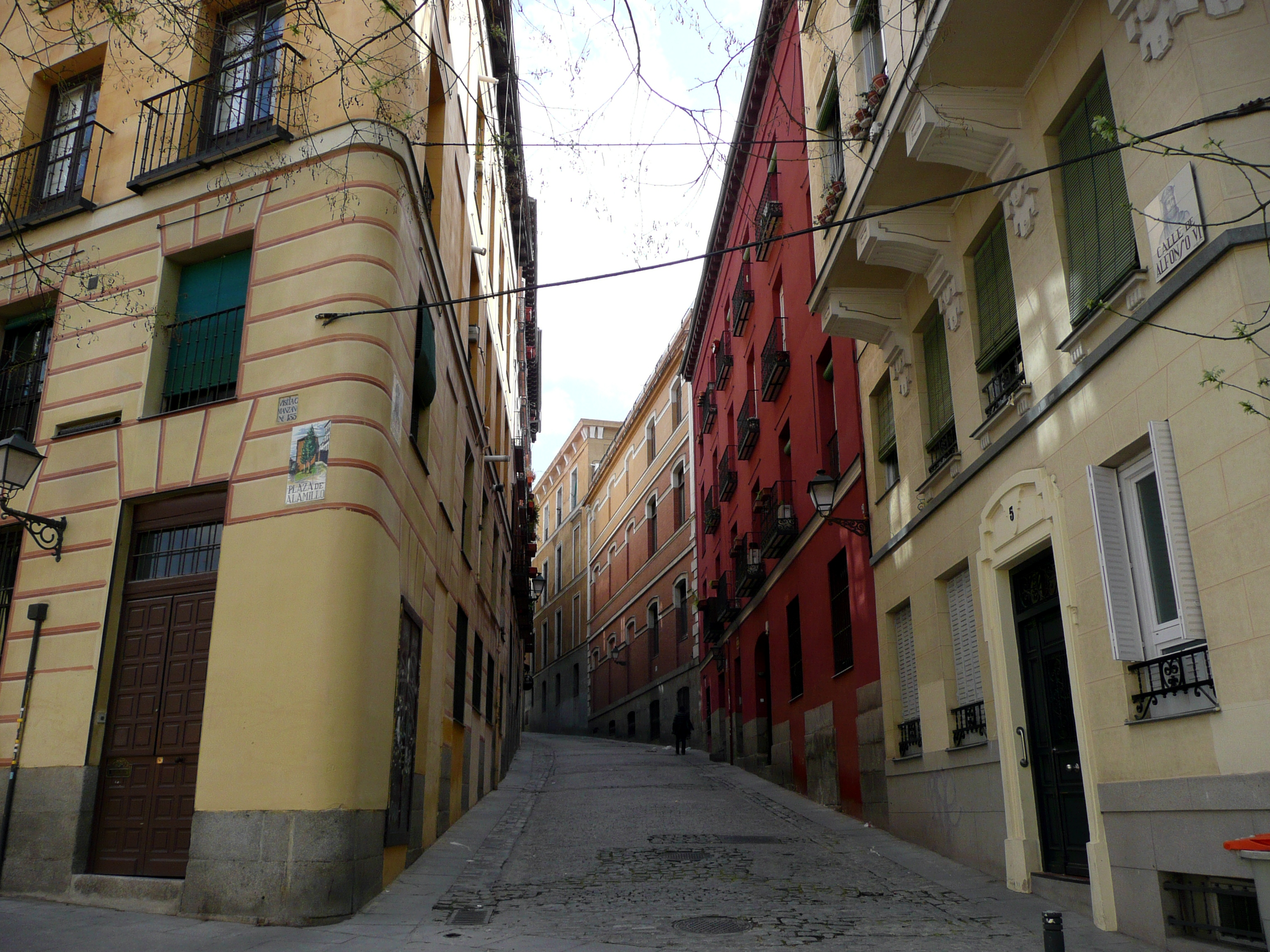 Madrid